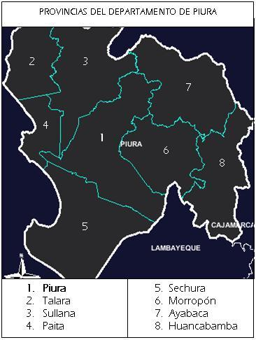 Mapa Provincias Piura